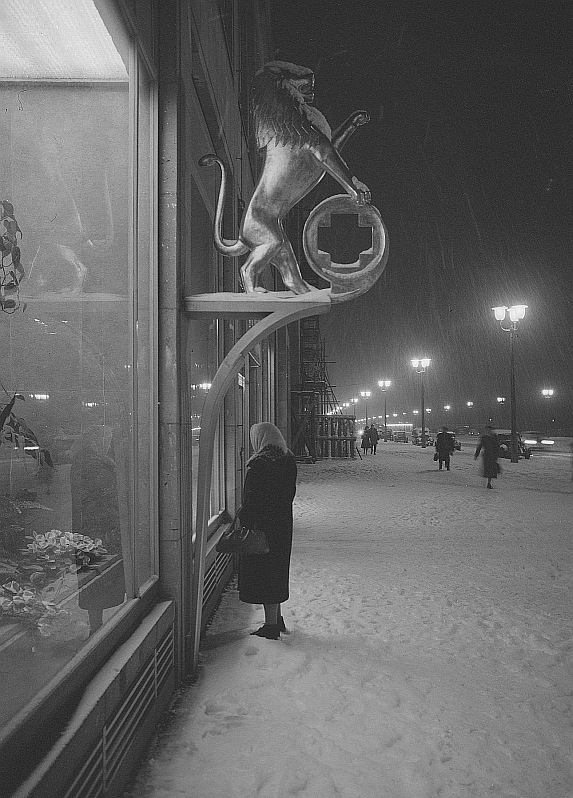 Original image description from the Deutsche Fotothek Dresden. Südseite der Ernst-Thälmann-Straße